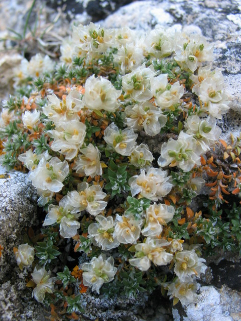 Sierra del Moncayo, Zaragoza